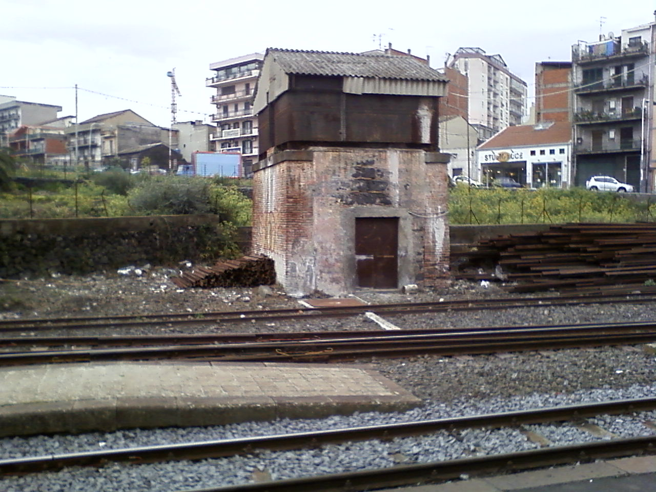 Vecchia torre serbatoio dell'acqua per le locomotive a vapore nella stazione di Patertnò della Ferrovia Circumetnea